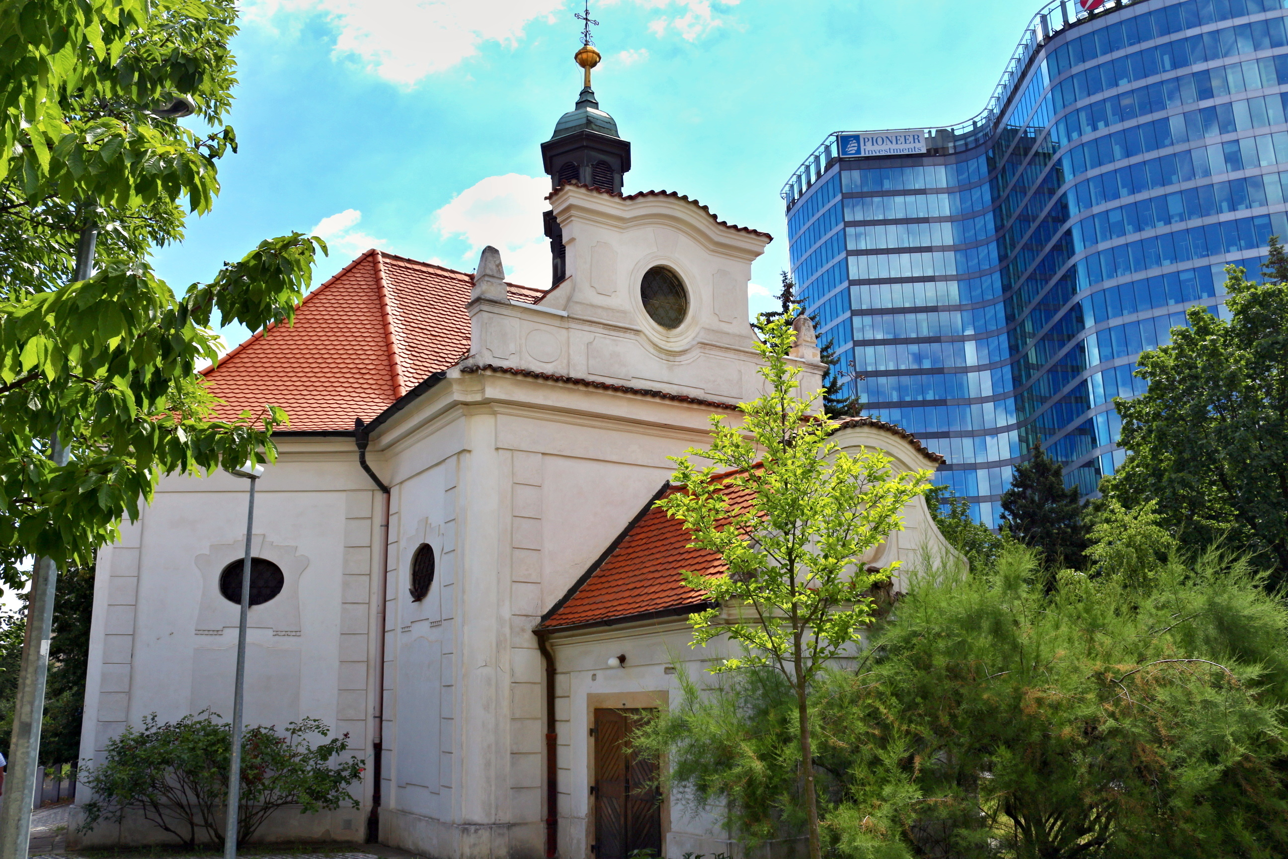 Kostel Narození Panny Marie v Michli